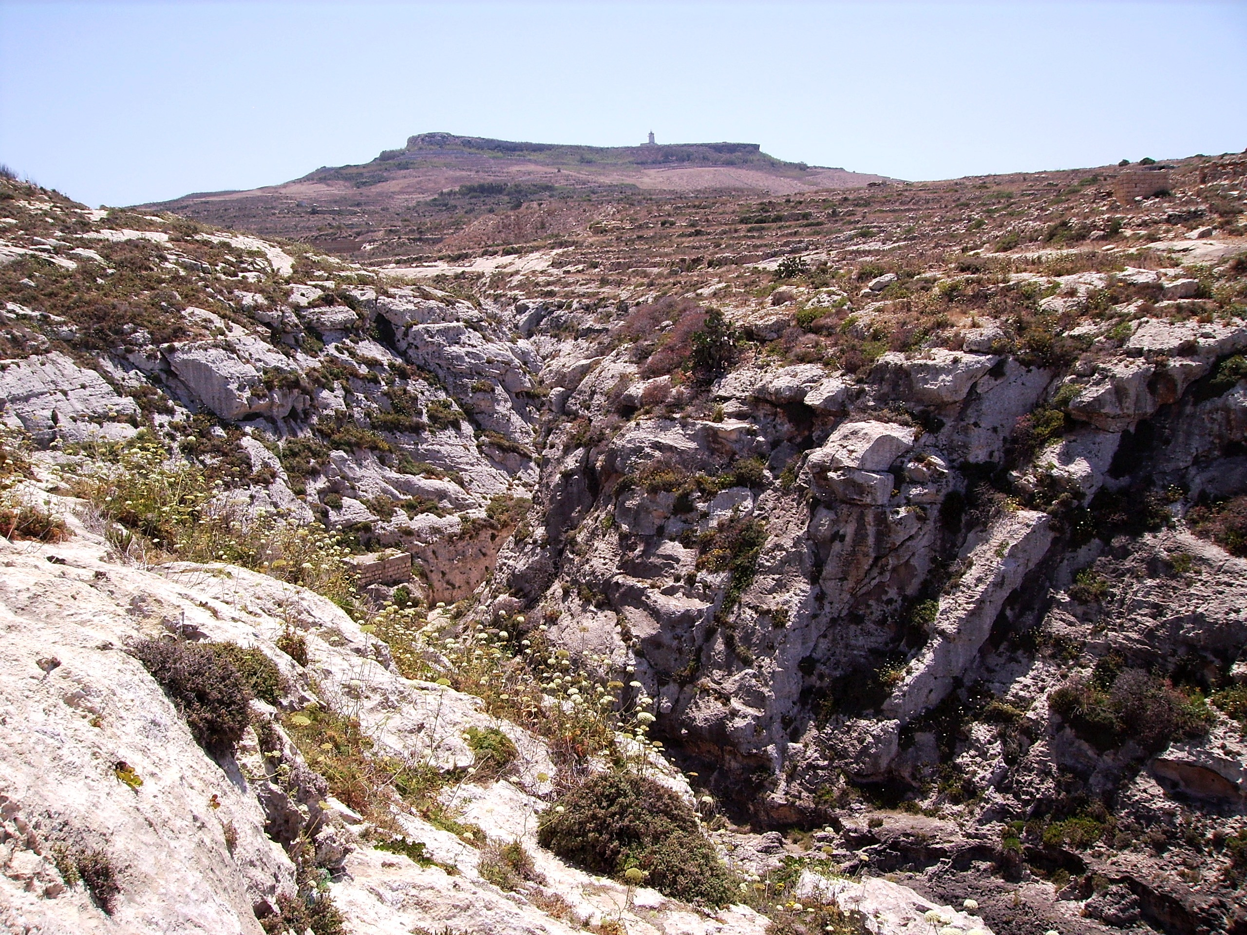 Ghasri Valley Land